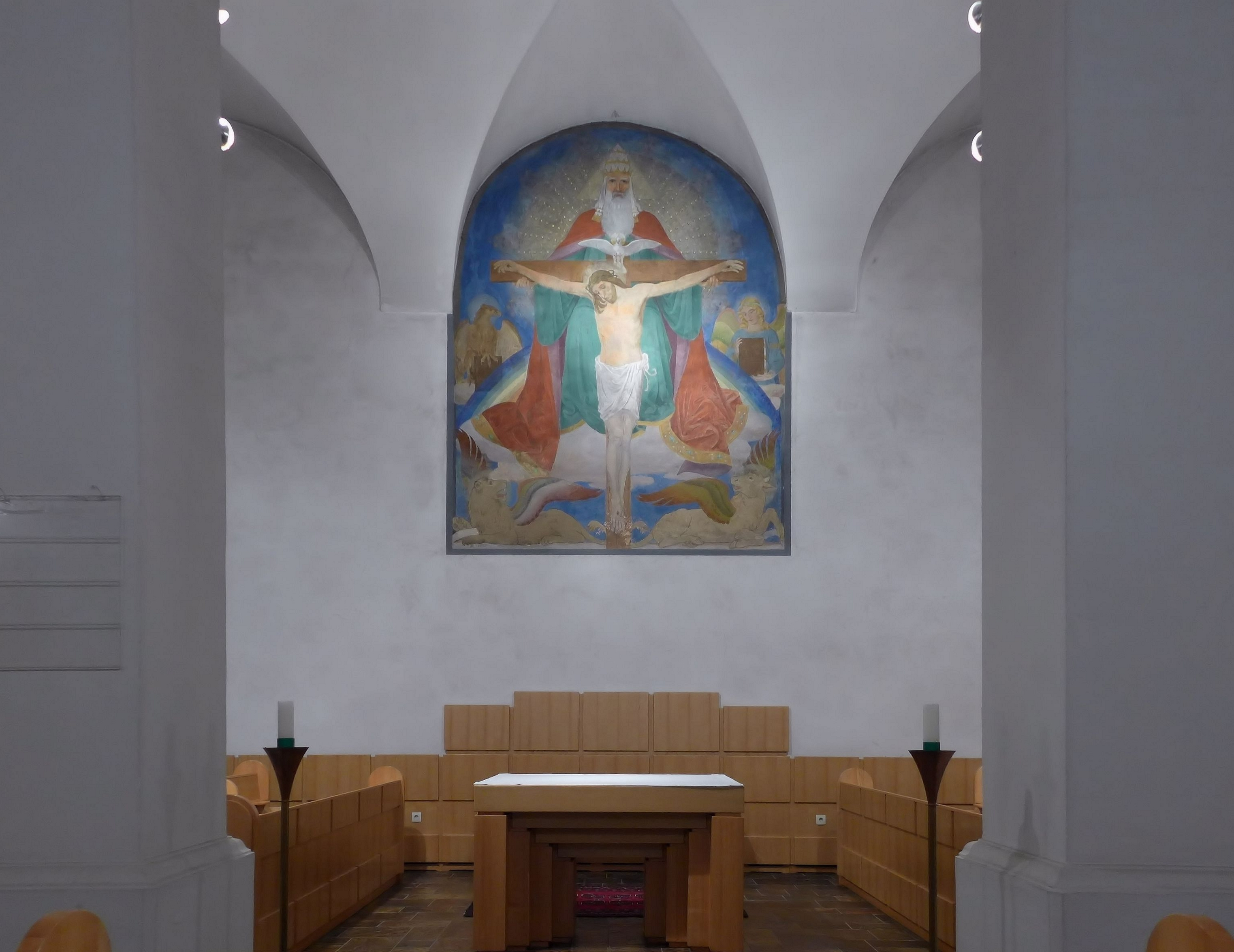 Basilika Seckau, Chorkapelle